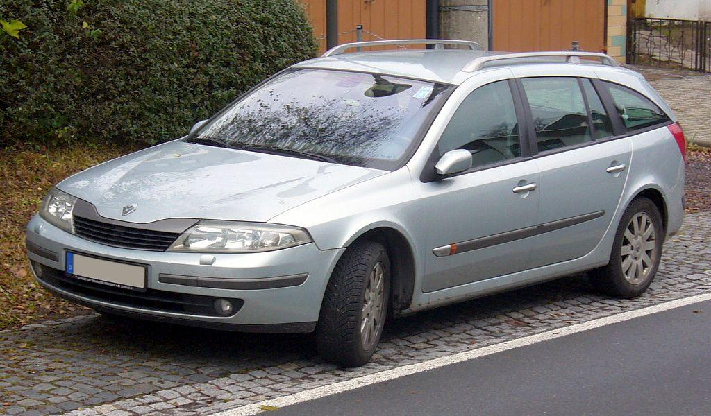 Renault Laguna II Grandtour Phase I